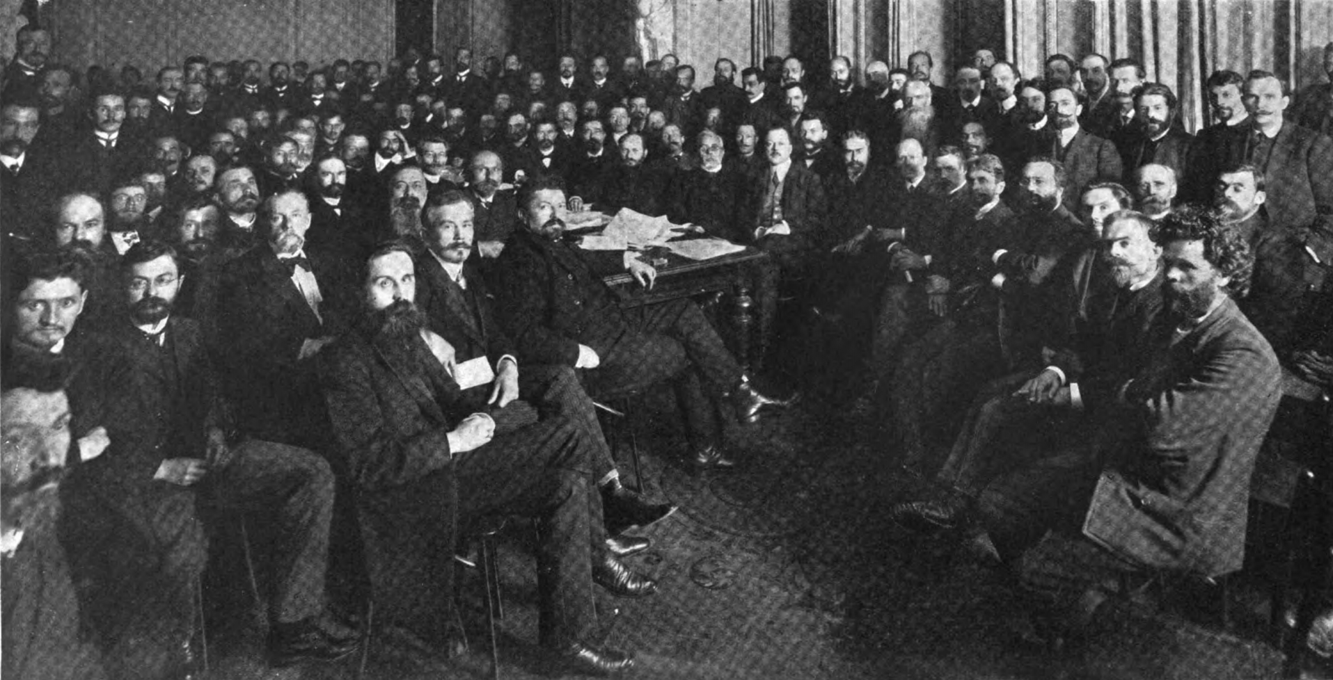 Объединённое заседание всех обвиняемых, бывших членов I-й Государственной Думы по делу о "выборгском воззвании" 11 декабря 1907 года. Приговором суда все обвиняемые, кроме двух, приговорены к 3-х-месячному тюремному заключению.